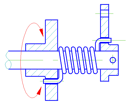 vinutá zkrutná pružina - namáhaná ohybem